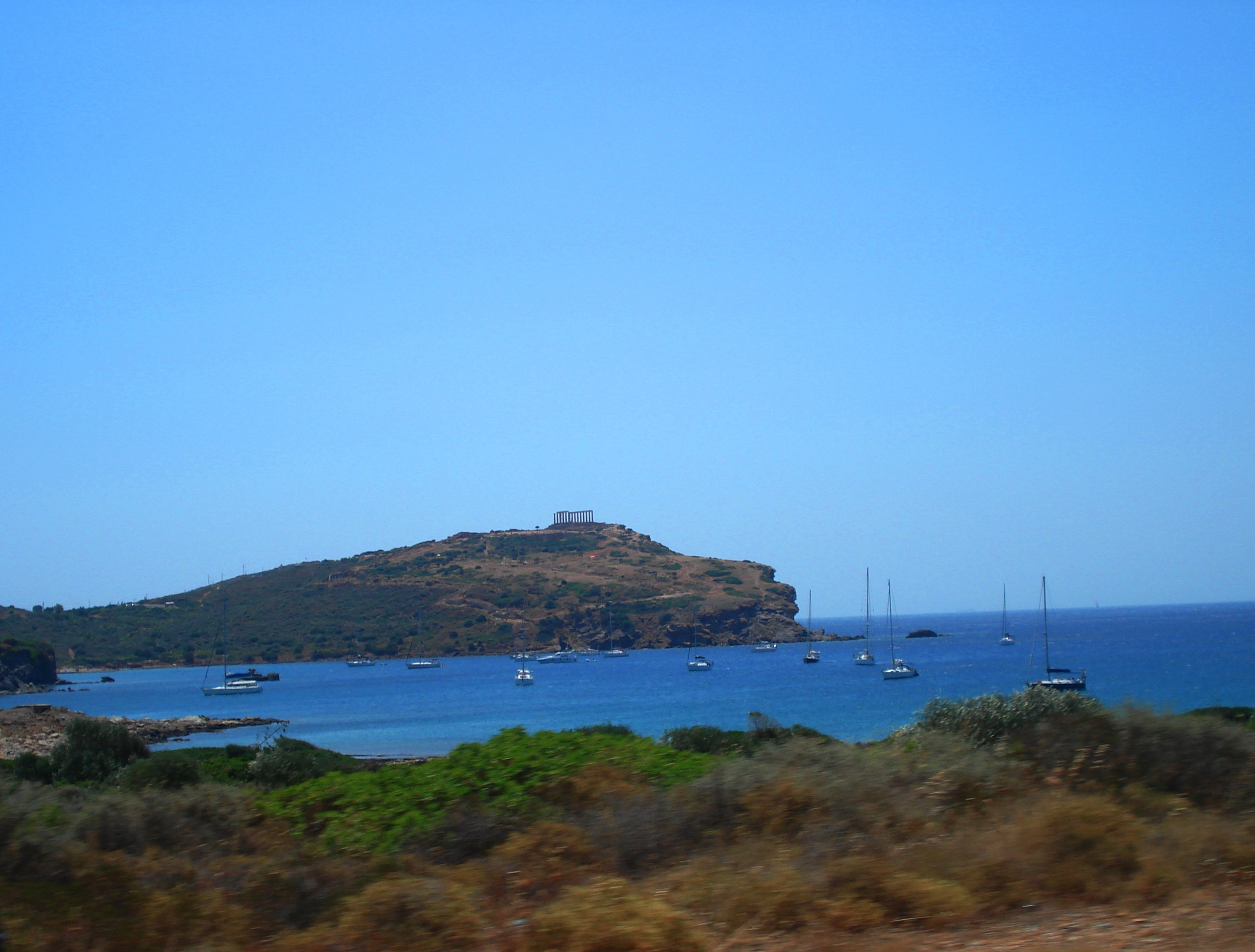 Σούνιο, αρχαιολογικός χώρος«Σούνιο, αρχαιολογικός χώρος»